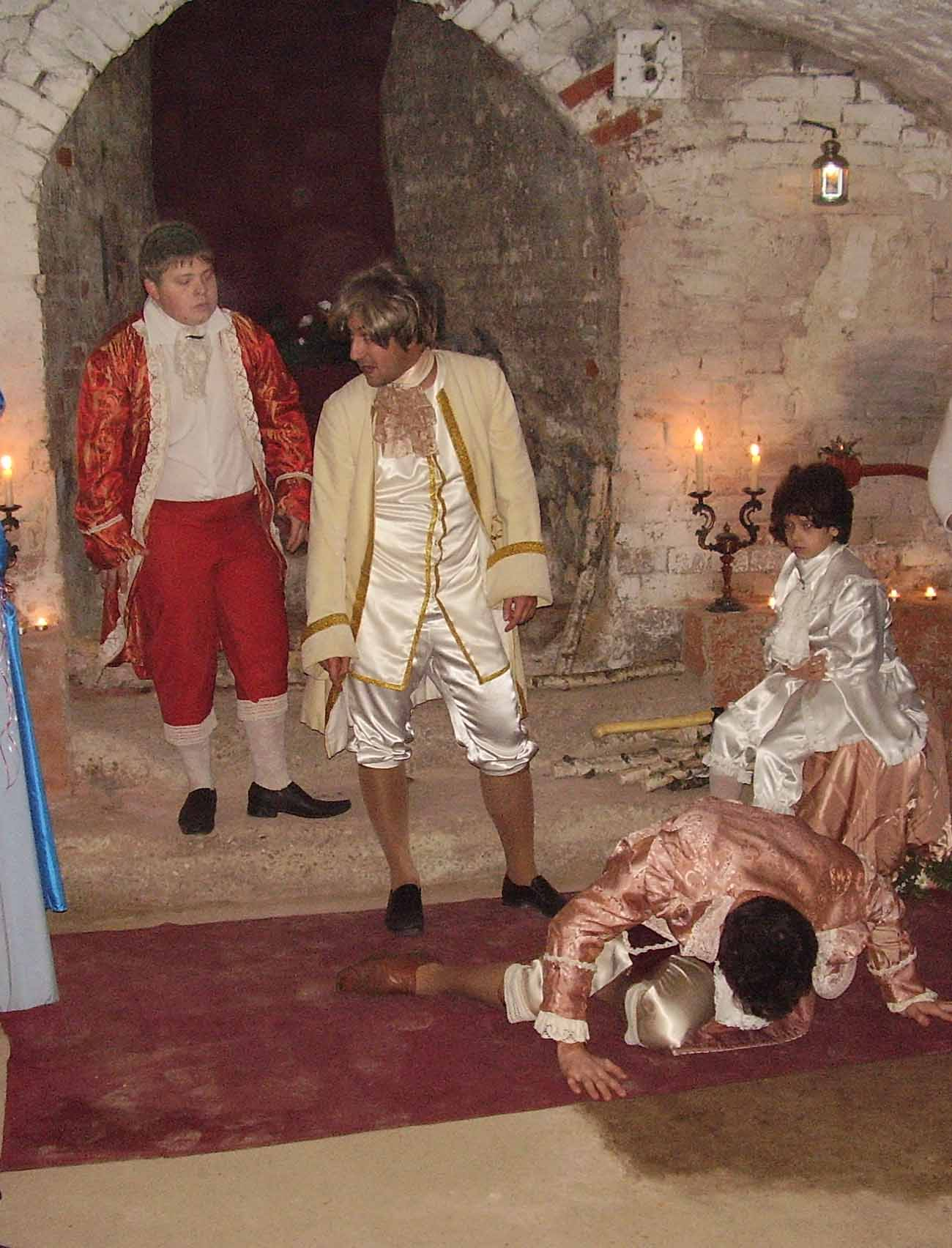 спектакль " Несчастные сирты"